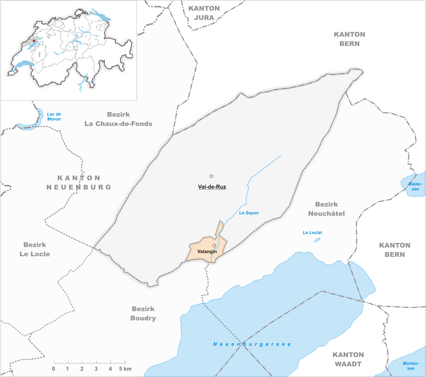 Municipality Valangin